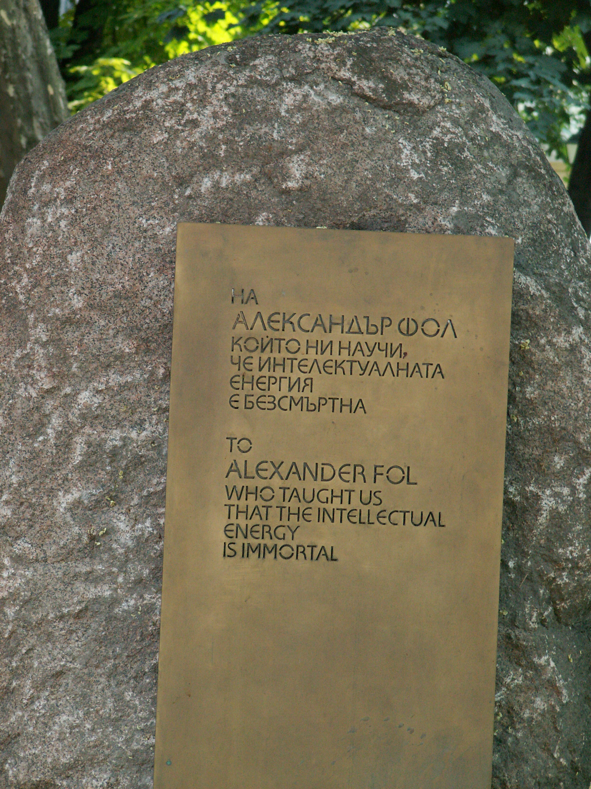 Monument à Aleksandar Fol devant le bâtiment de l'Institut de thracologie de l'Académie bulgare des sciences, Sofia